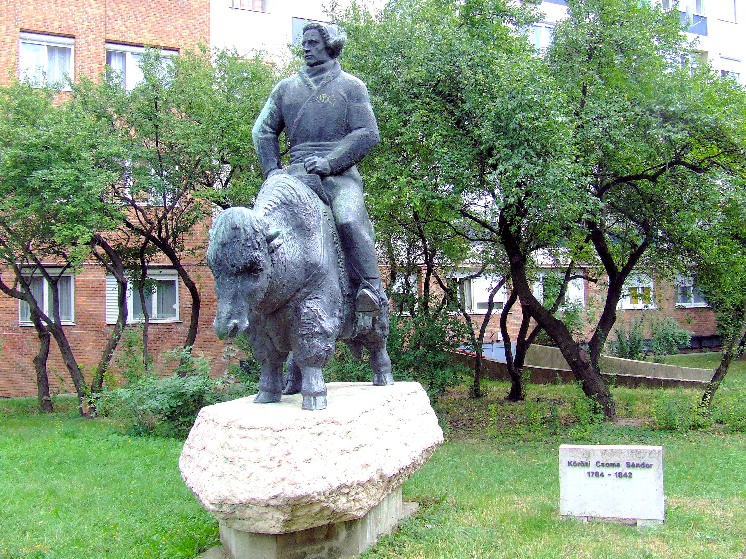 Kőrösi Csoma Sándor szobra Pécsen. Antal Károly (1909–1994) alkotása (1968)